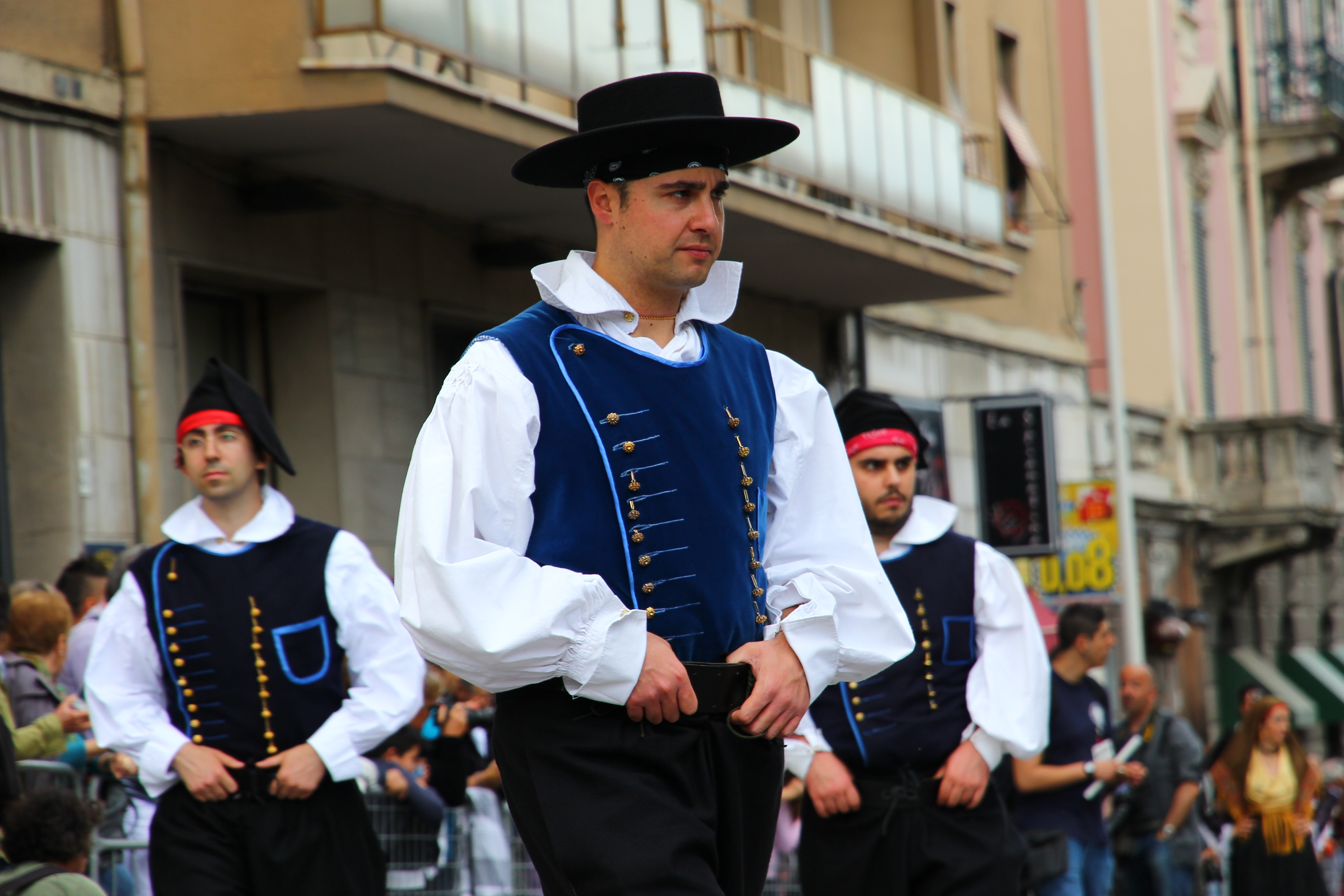 Cavalcata Sarda 2013 (Sassari)